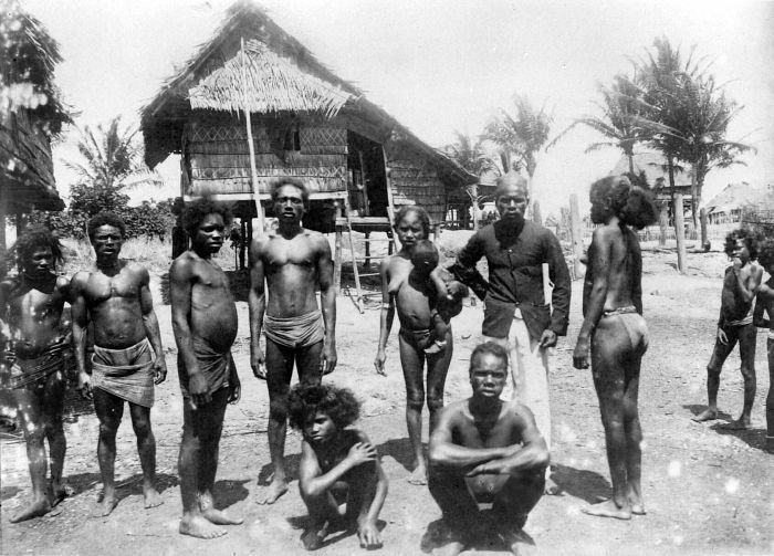 Repronegatief. Mensen van de Aroe-eilanden op een van de Kai-eilanden